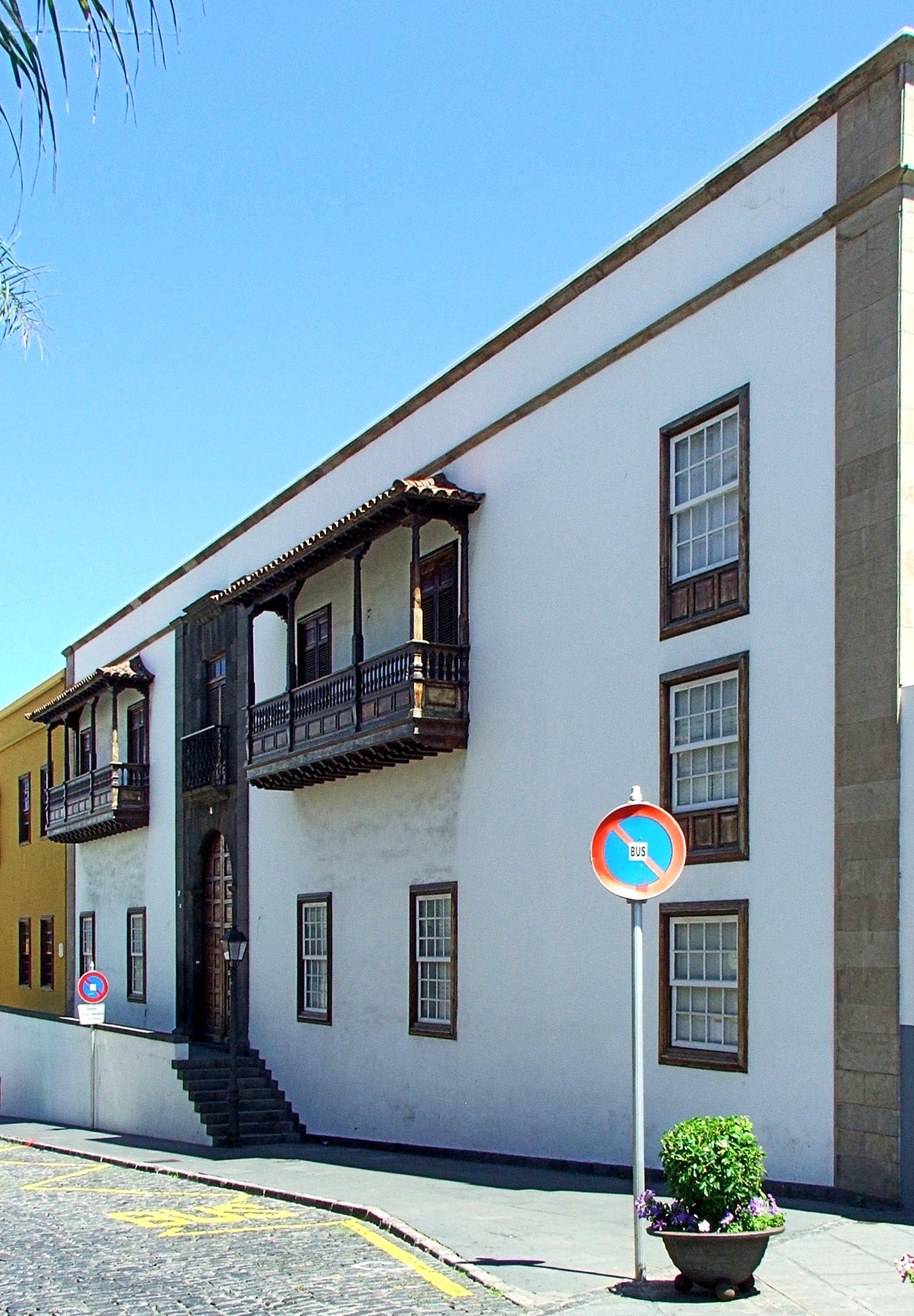 Casa Rahn, wiederaufgebaute Fassade des Dominikanerklosters in Puerto de la Cruz